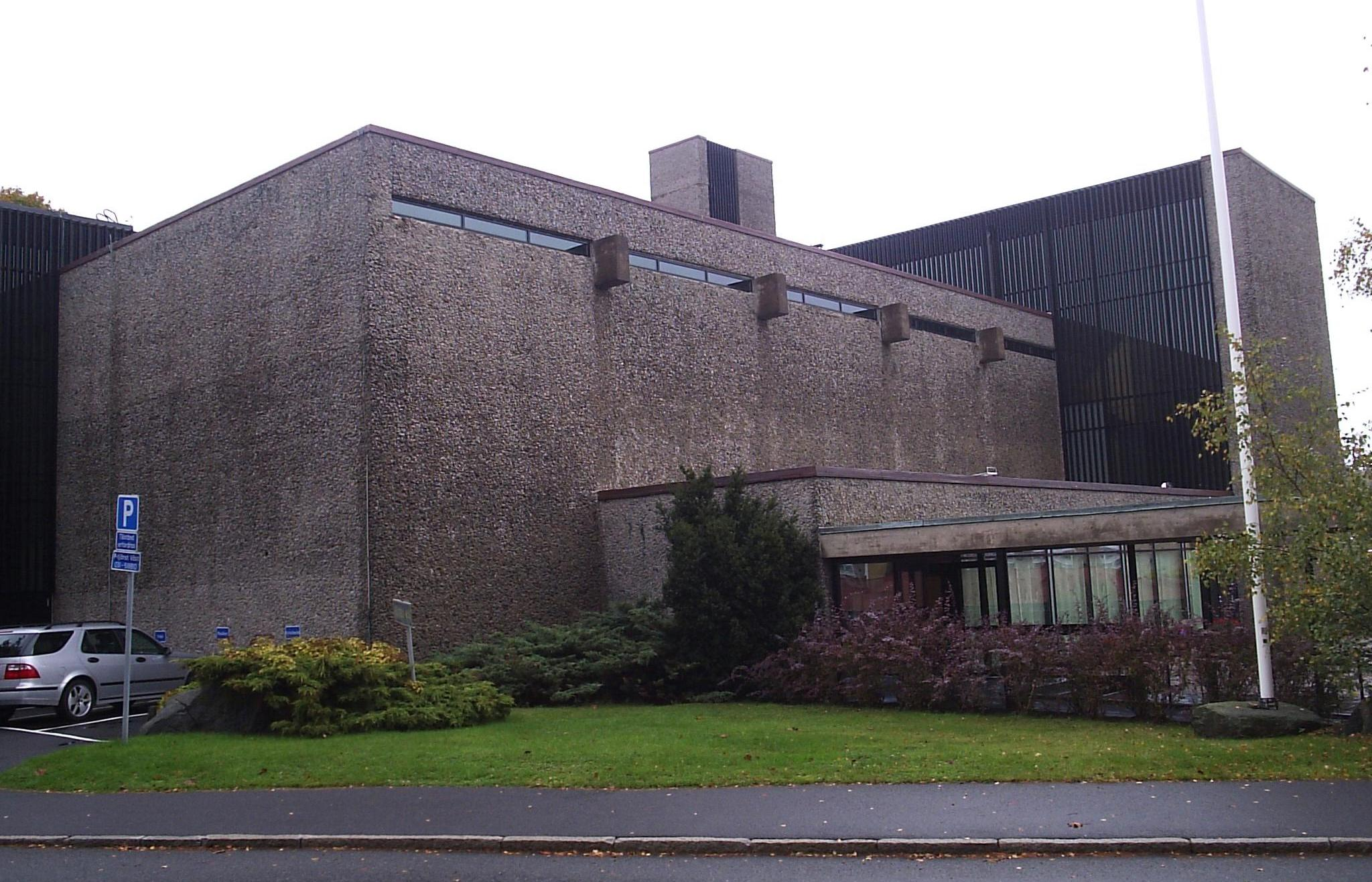 Högsbo kyrka i Göteborg, den 22 oktober 2005. Bilden är fotograferad av Harri Blomberg.